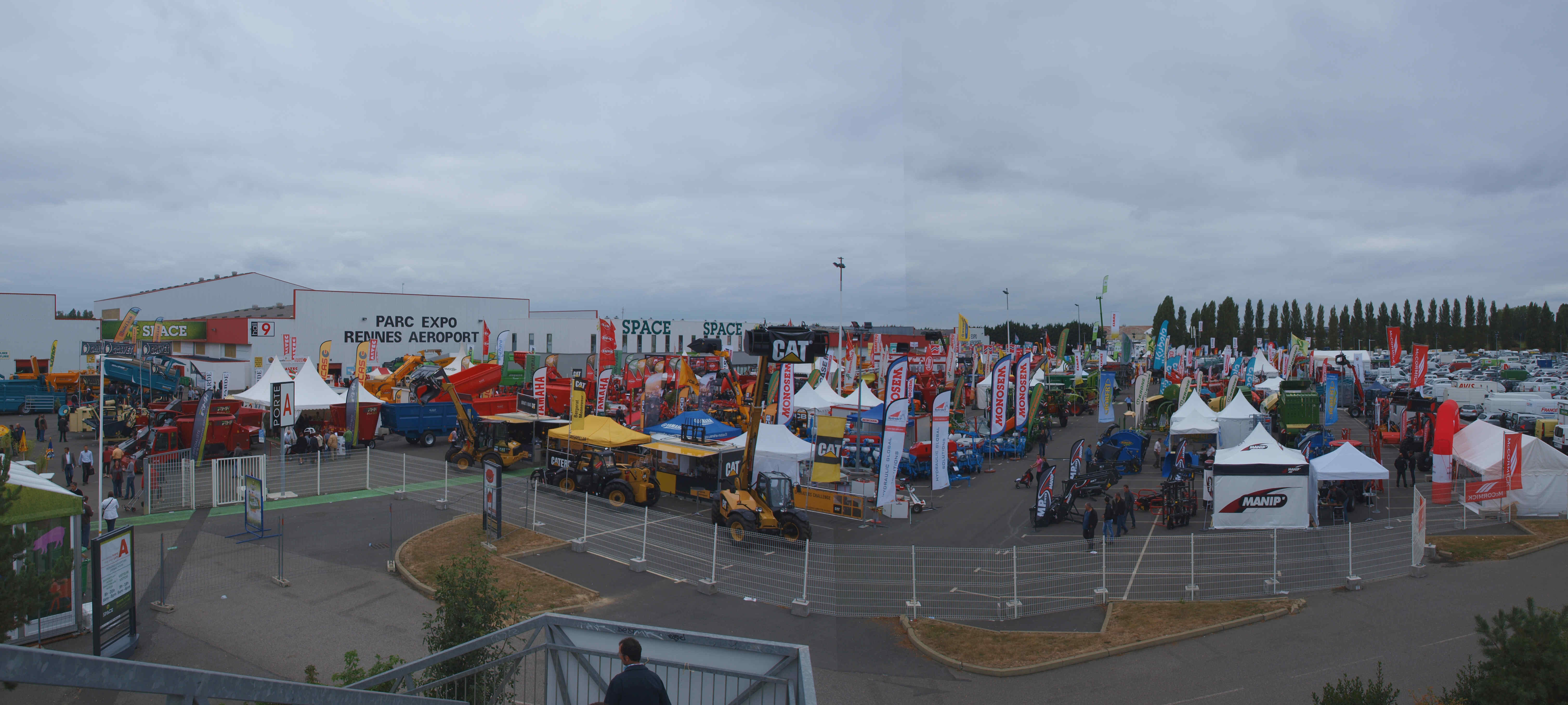 Salon des productions animales - carrefour européen (SPACE) 2012; entrée A, depuis la passerelle qui enjambe la voie rapide.